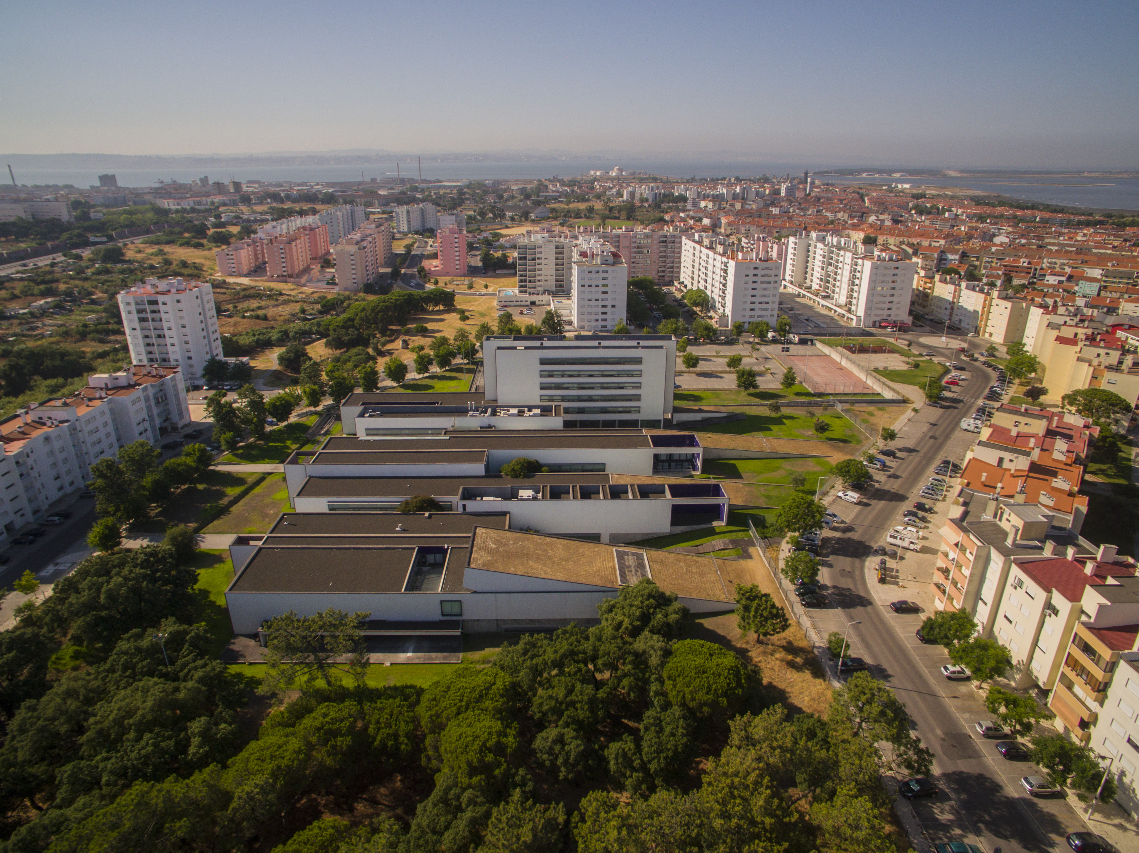 Vista aérea do campus do IPS no Barreiro